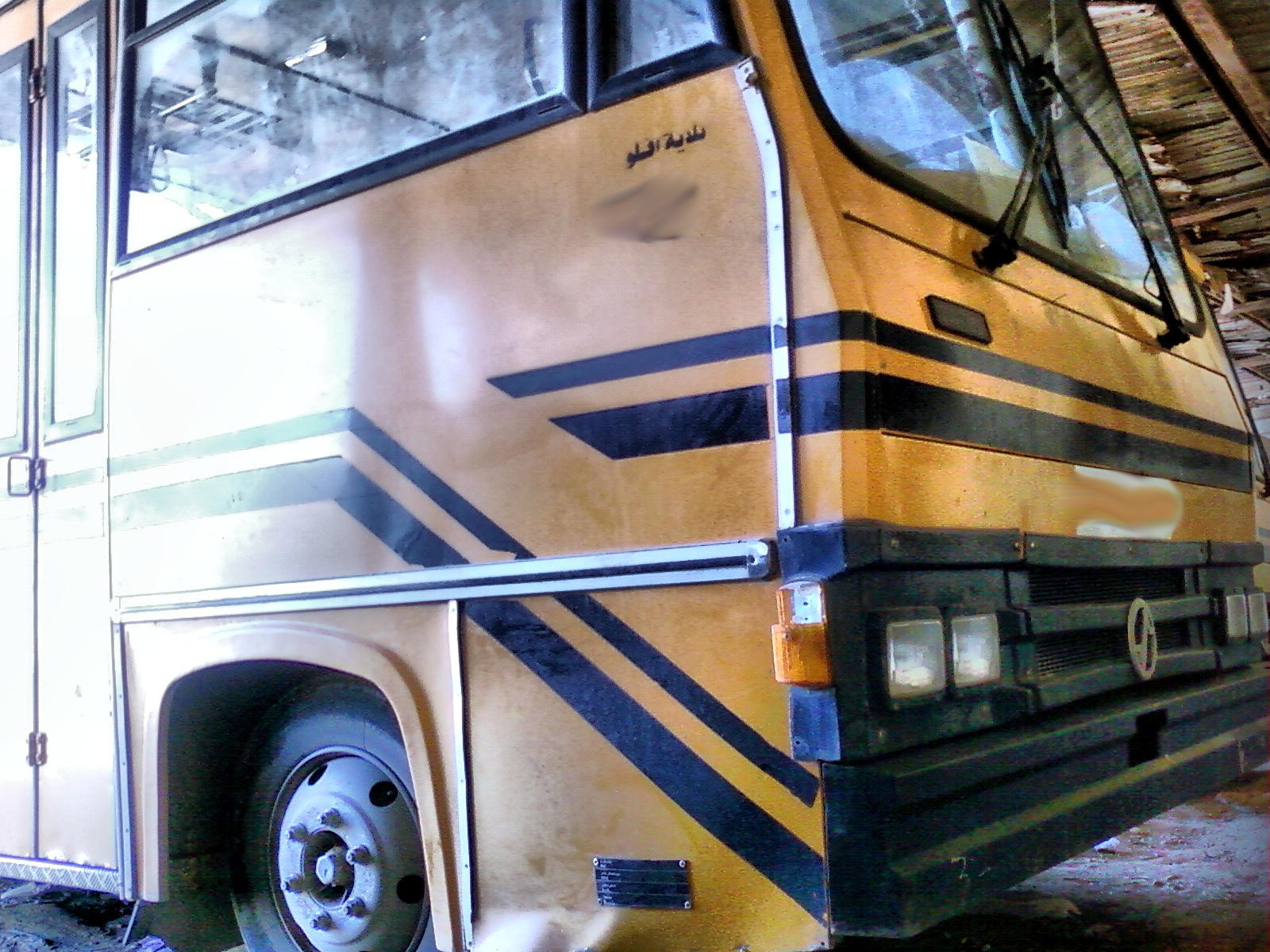 Photo prise à Aflou, wilaya de Laghouat, Algérie